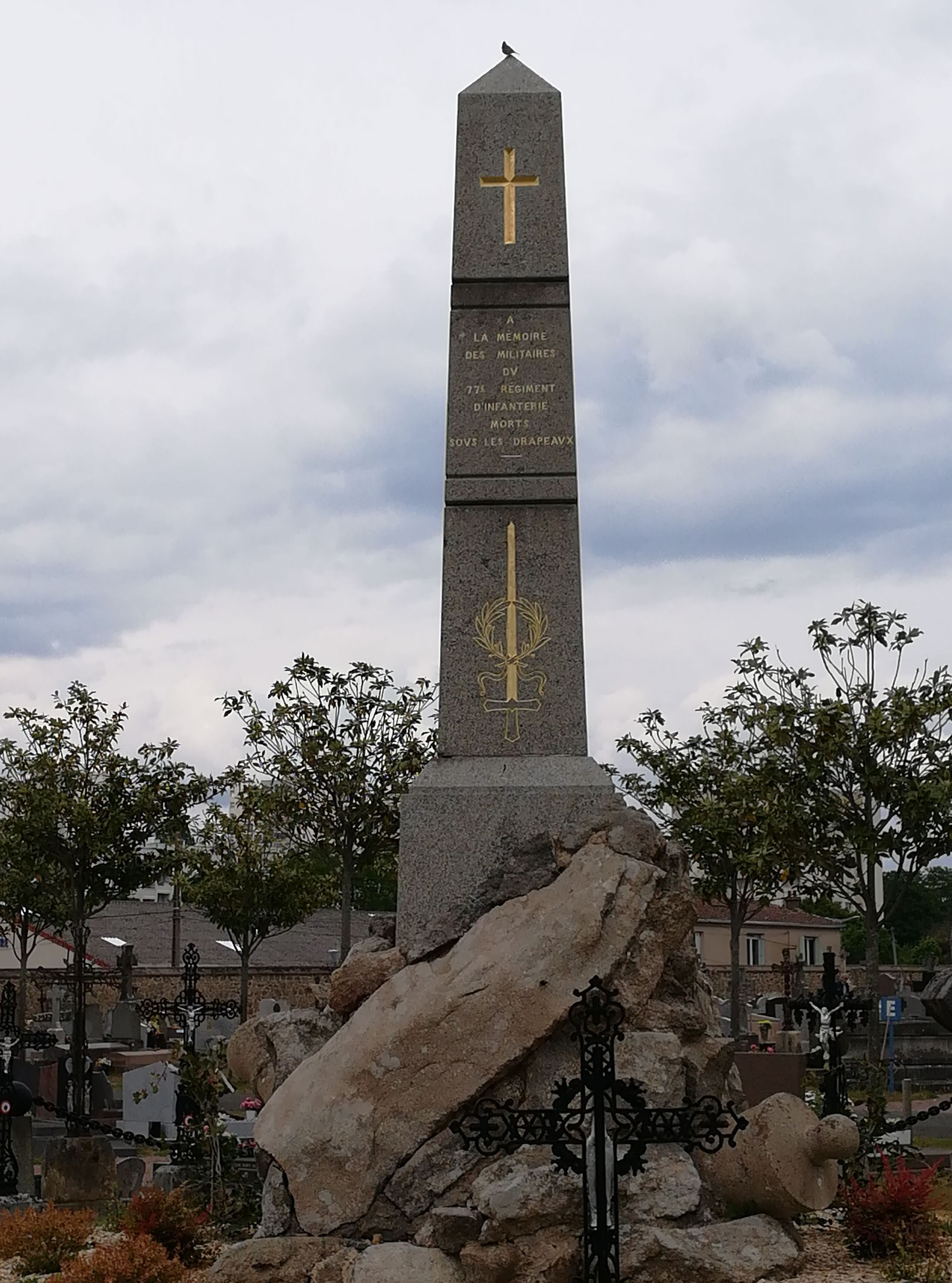 Monument aux morts du Template:77e régiment d'infanterie dans le cimetière de Cholet (49)